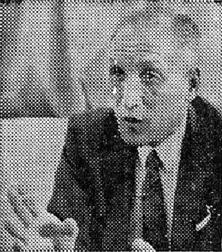 1967년11월16일.동아일보